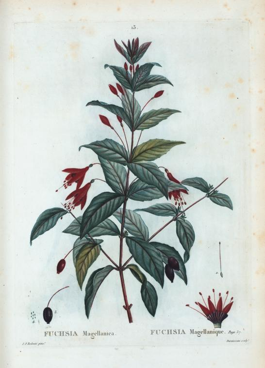 Fuchsia Magellanica = Fuchsia Magellanique.